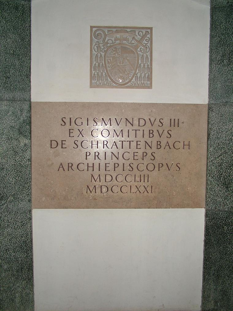 Grab Erzbischof Schrattenbach in der Krypta des Salzburger Doms